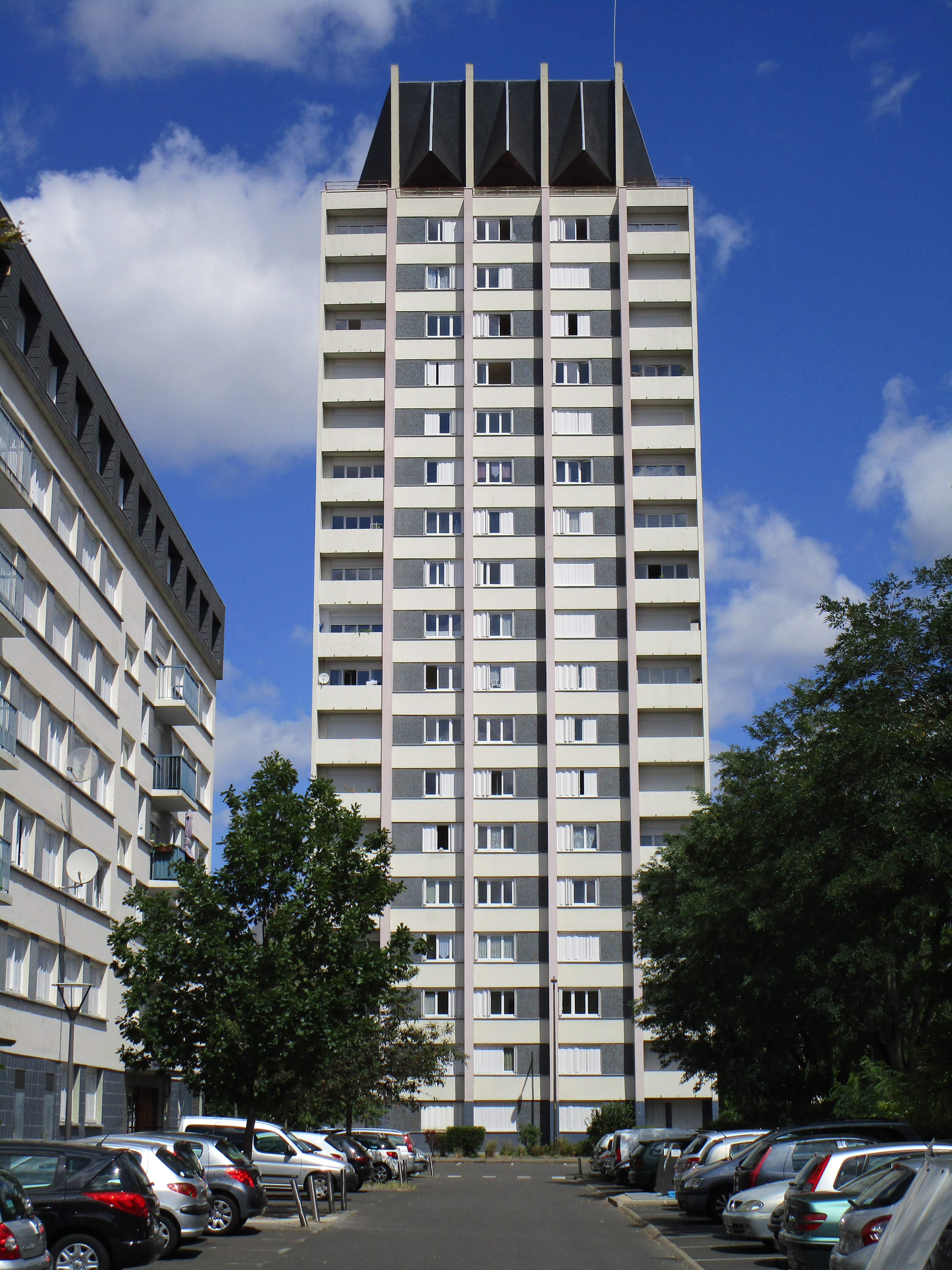 Vue d'une tour dans la partie est du quartier des Fontaines, à Tours, rue Johan Strauss.